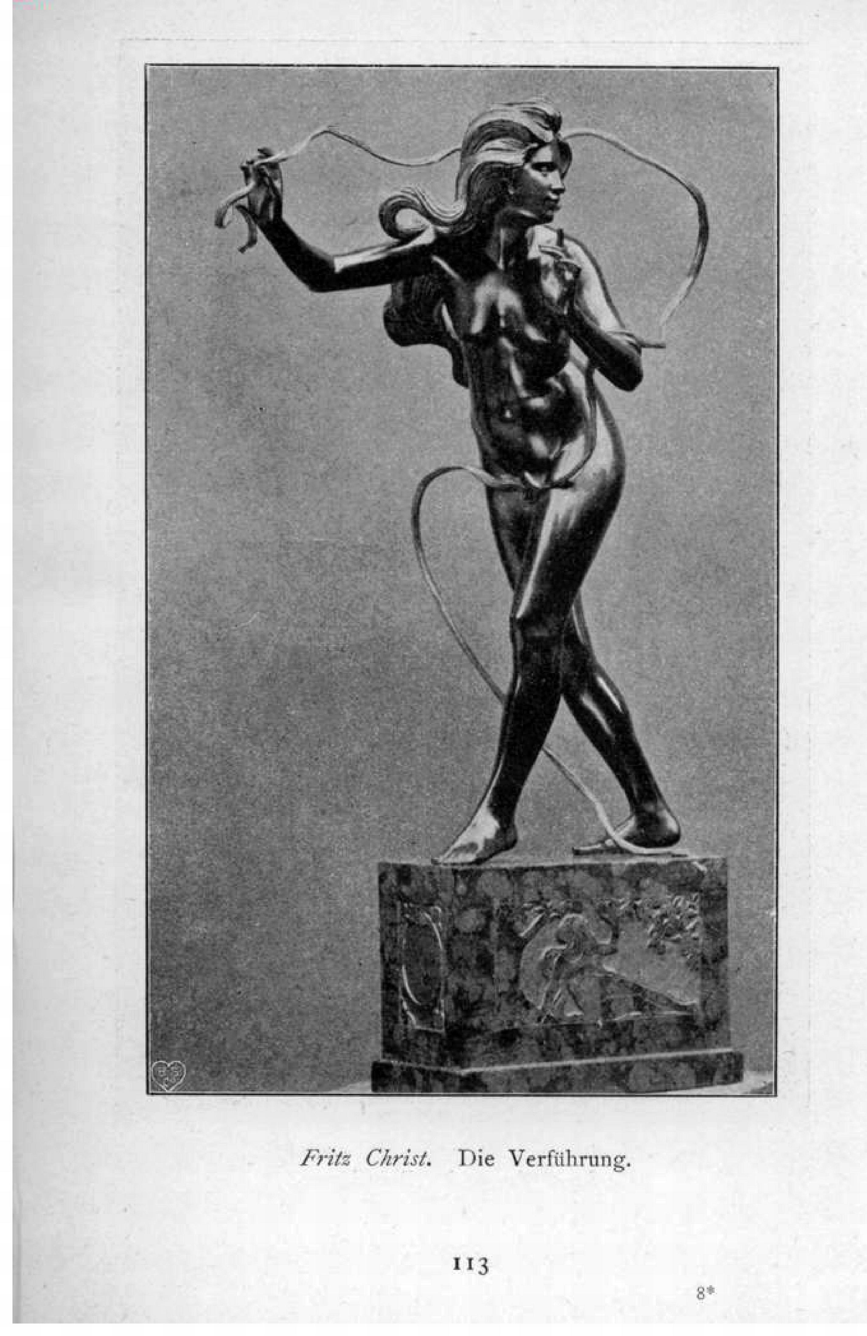 Die Verführung